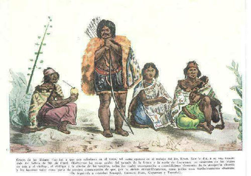 Dibuxu de Vaimaca escontra 1822. Remana de la páxina